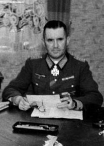 Zentralbild, II. Weltkrieg 1939 - 45 An der Westfront, 1944 Der Reichsminister für Rüstung und Kriegsproduktion Prof. Albert Speer bespricht mit dem Oberbefehlshaber einer Armee, General der Infanterie Gustav von Zangen, Nachschubfragen. H 28 061